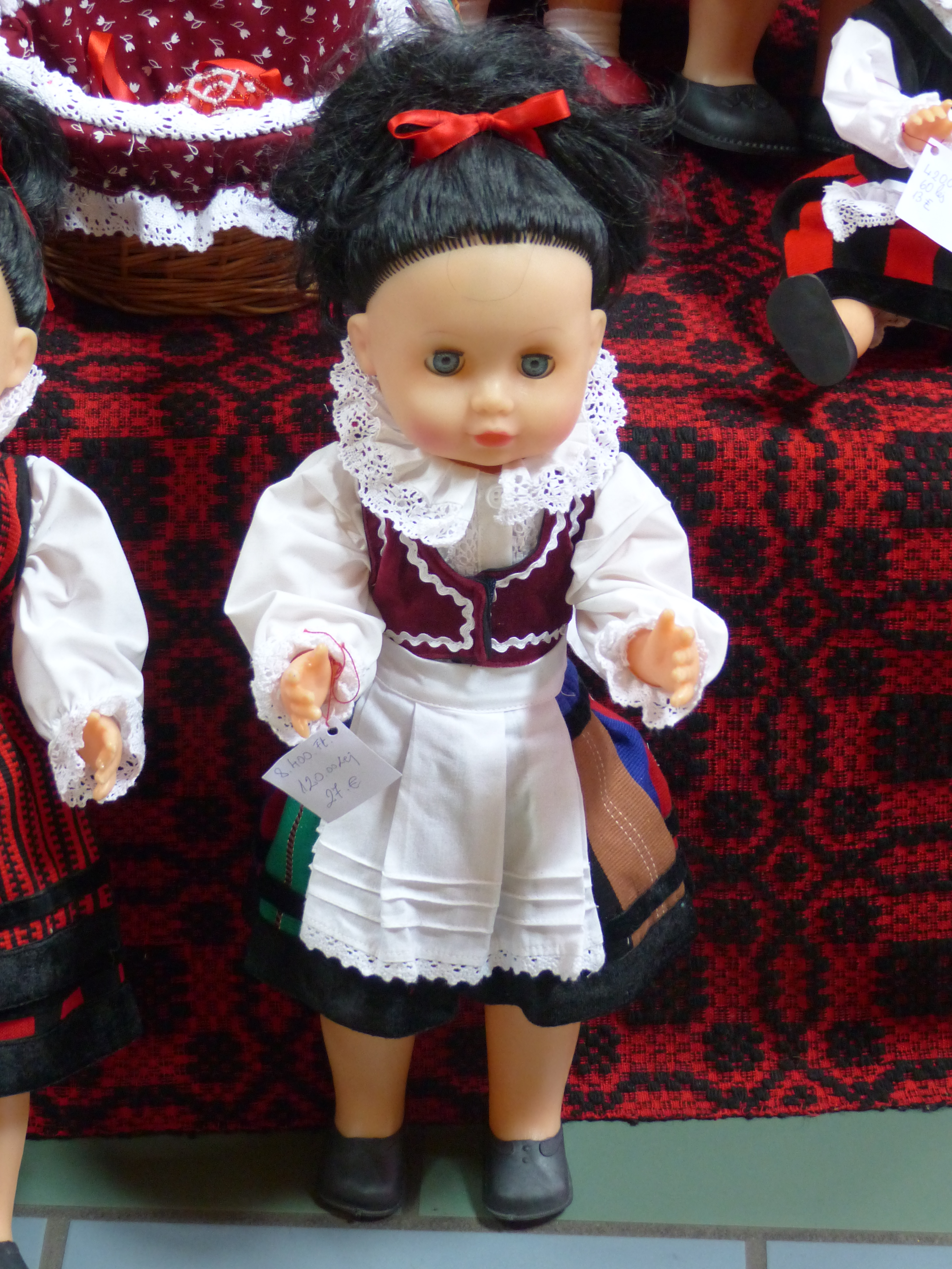 Székely babák. A felvétel 2017. április 26-án készült a Nagycsarnokban, Budapesten. Székely Napok.